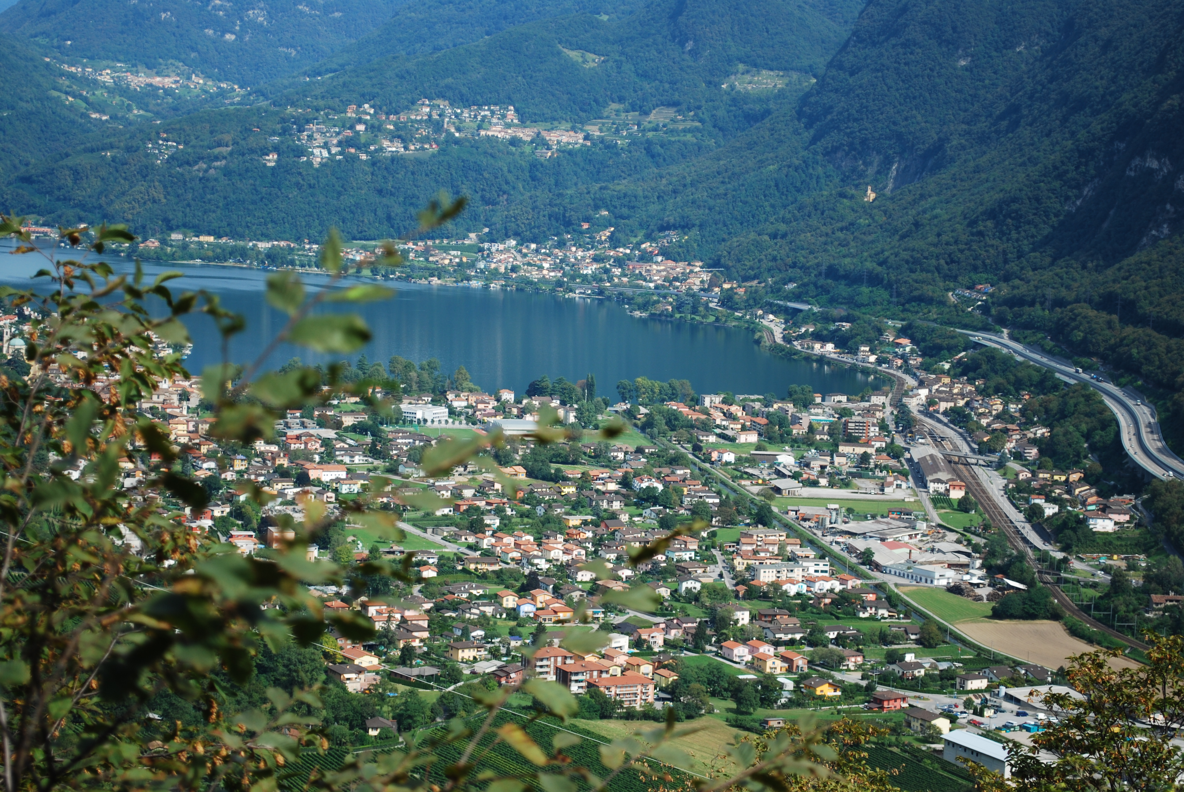 Vista sul Ceresio dal Grotto Grassi di Tremona